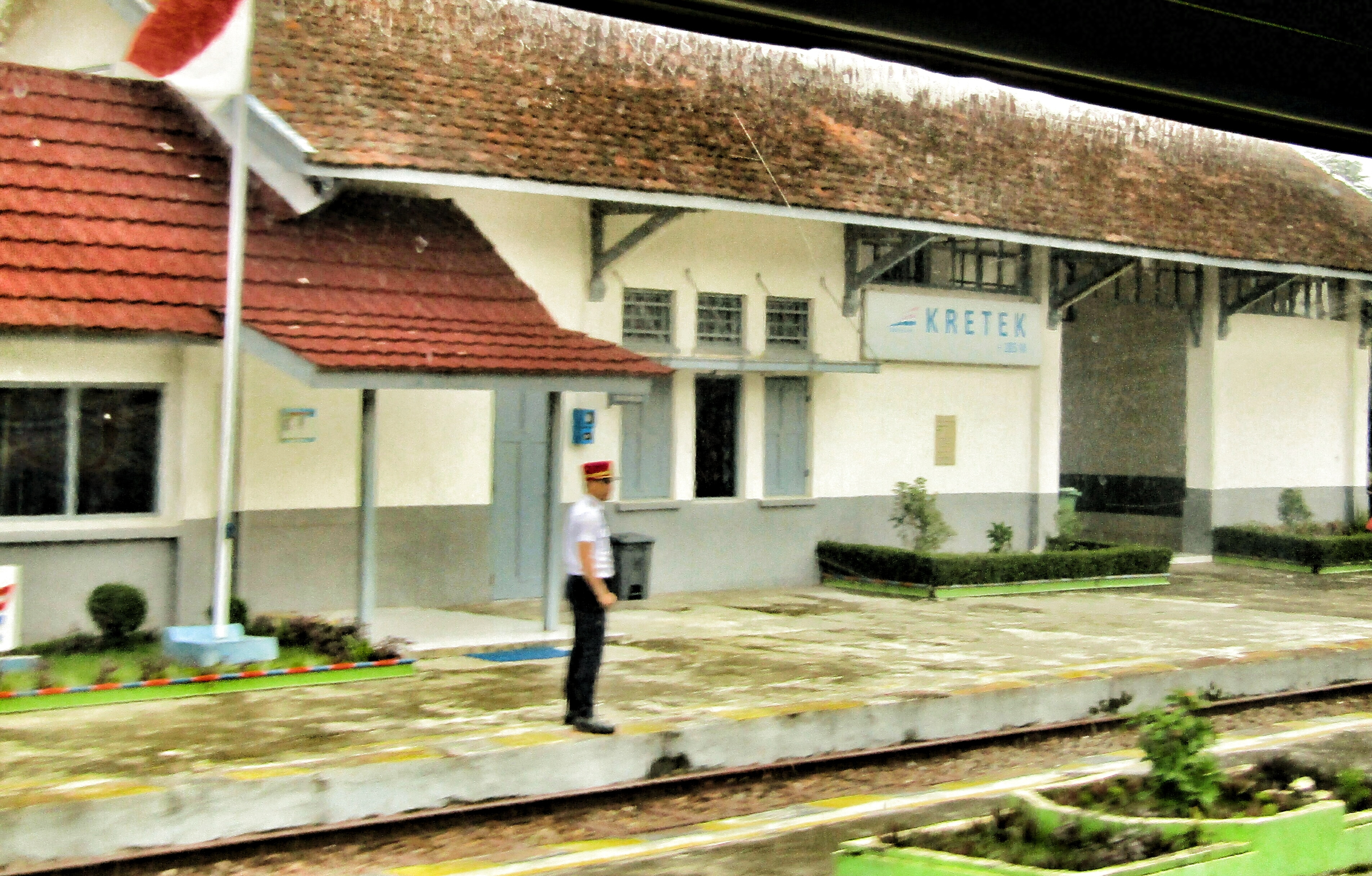 Tampak peron Stasiun Kretek, 2019